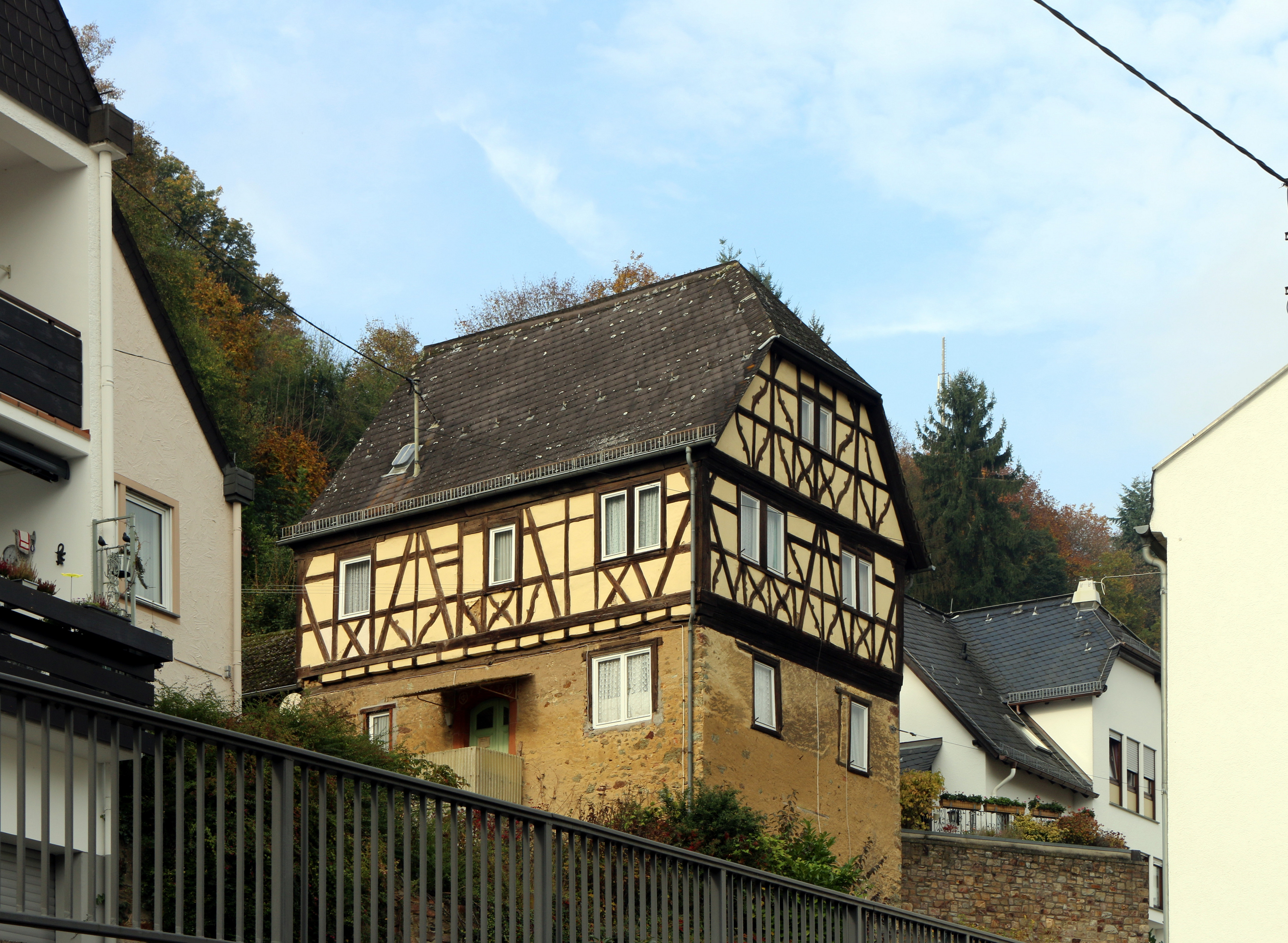 Wiesbaden, Schierstein: Falkersche Hof, wiedererbaut 1573, vermutlich ursprünglich im Besitz des Bischofs von Mainz